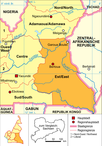 Politische Karte von Kamerun (Provinz Est hervorgehoben)